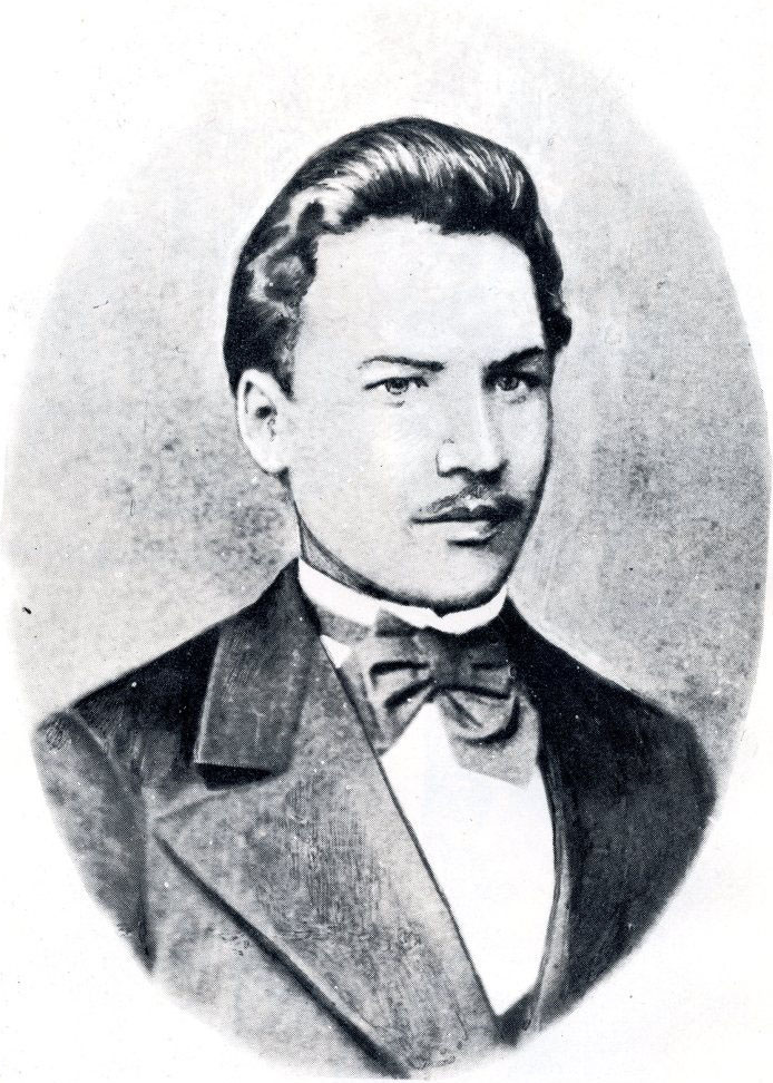 Авксентий Юртов в молодости